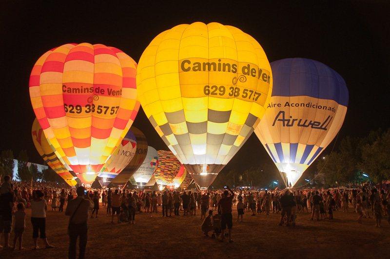 European balloon Festival 2011 Camins de Vent